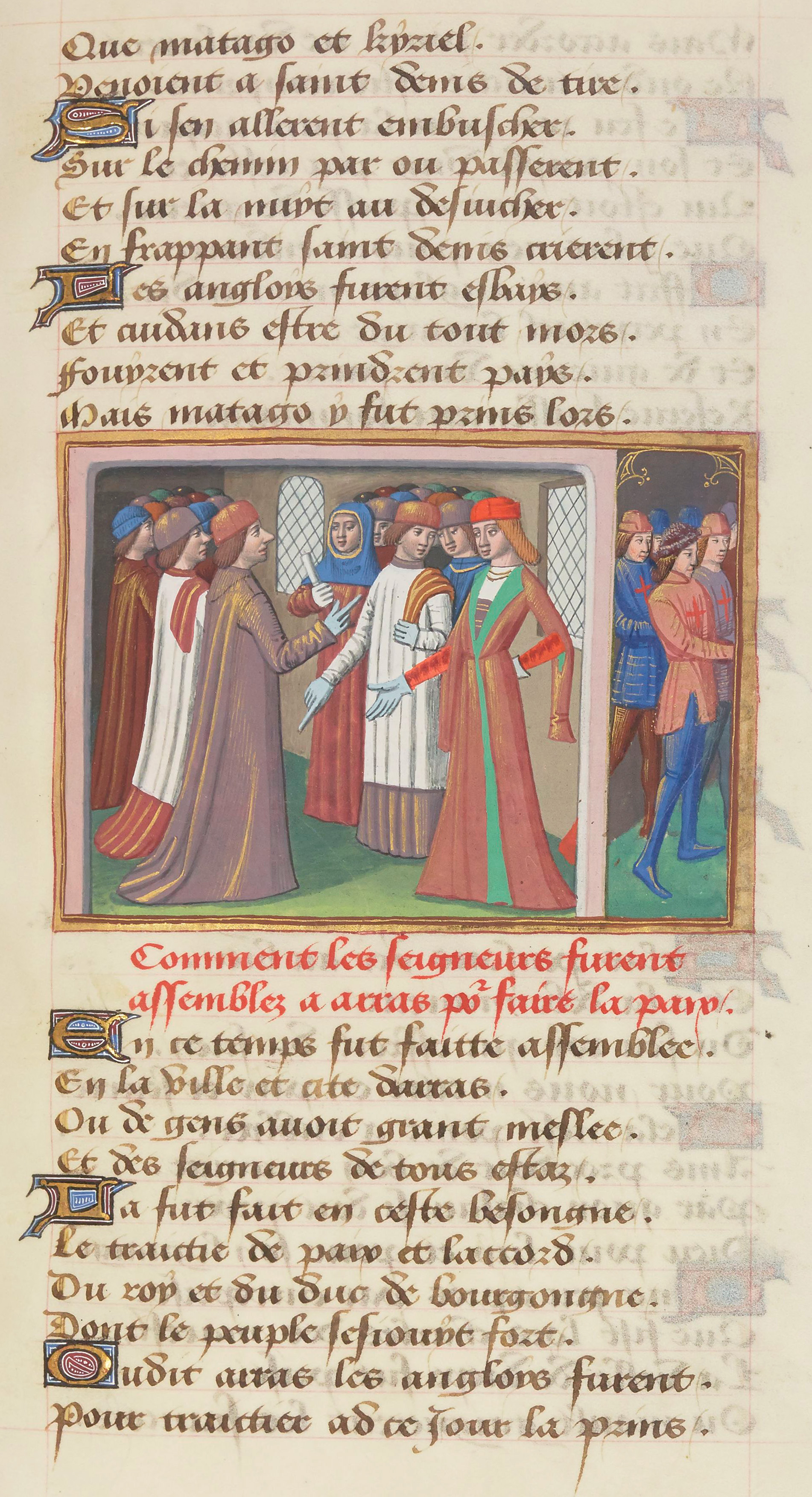 Conférences d'Arras (1435). Enluminure du manuscrit de Martial d'Auvergne, Les Vigiles de Charles VII, vers 1484, BnF, Manuscrit Français 5054, enluminure du folio 86 recto.